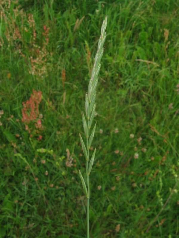 Kriechende Quecke (Elytrigia repens), Gragetopshof